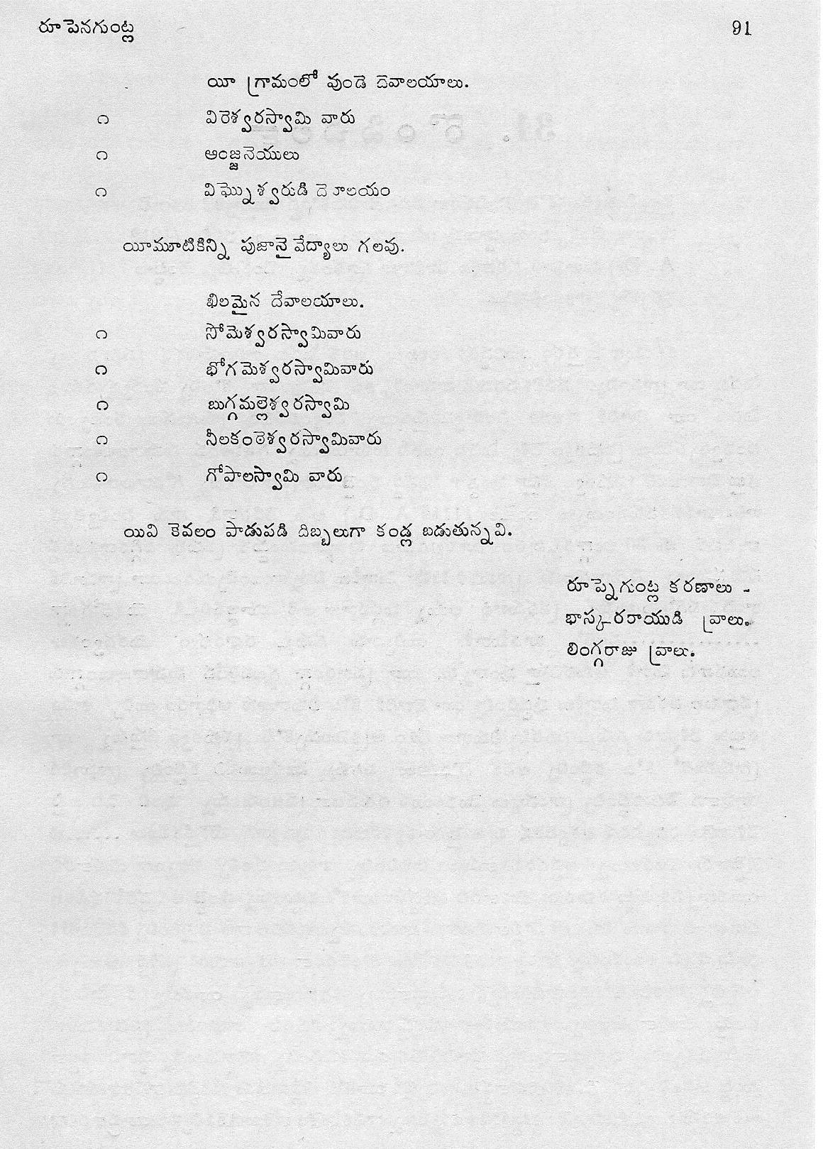 Rupenguntla Kaifiyat Page-2